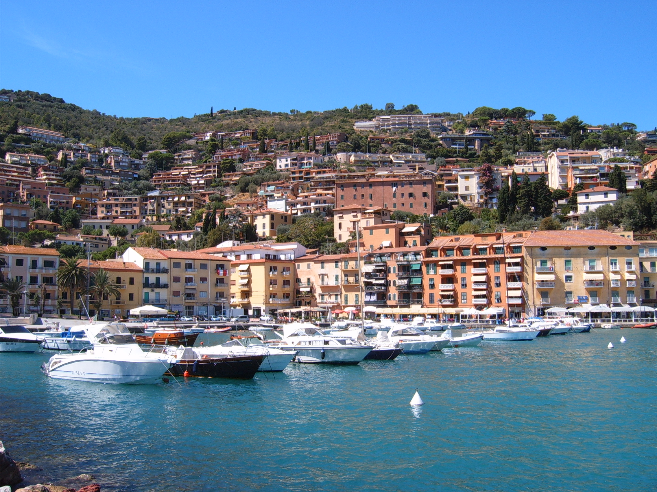 Porto Santo Stefano, Monte Argentario (Italy)